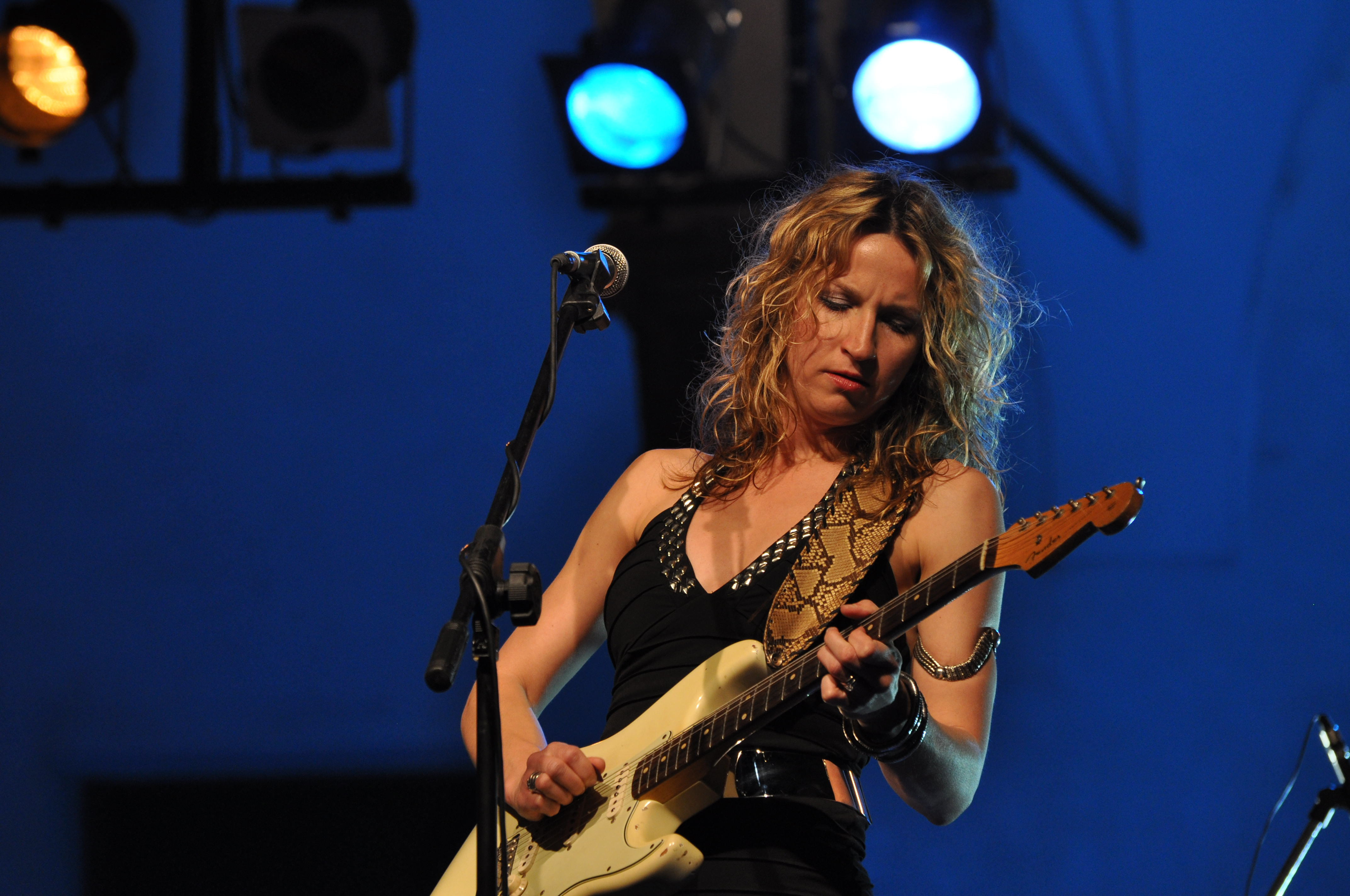 Ana Popovic